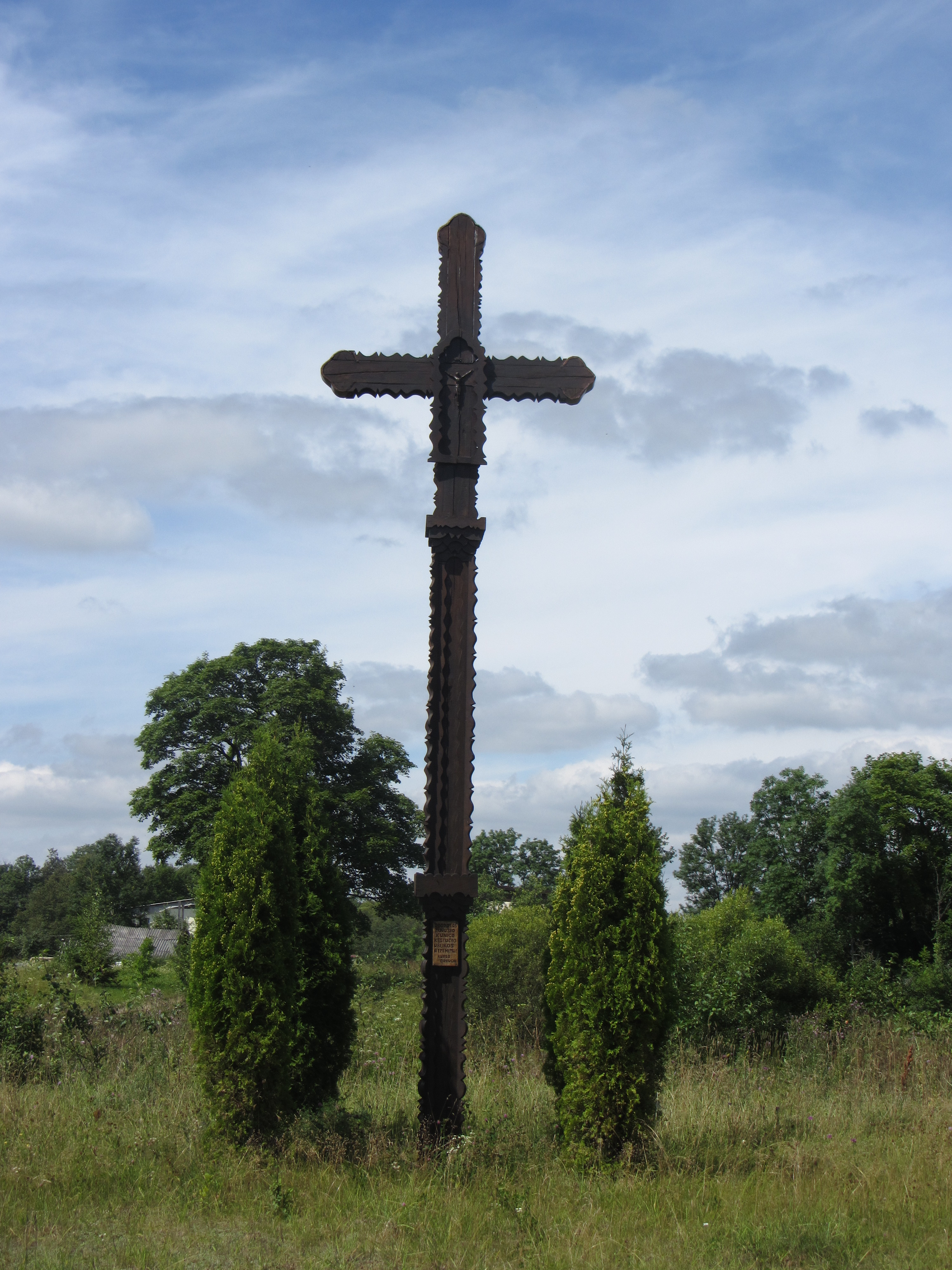 Luokesos sen., Lithuania